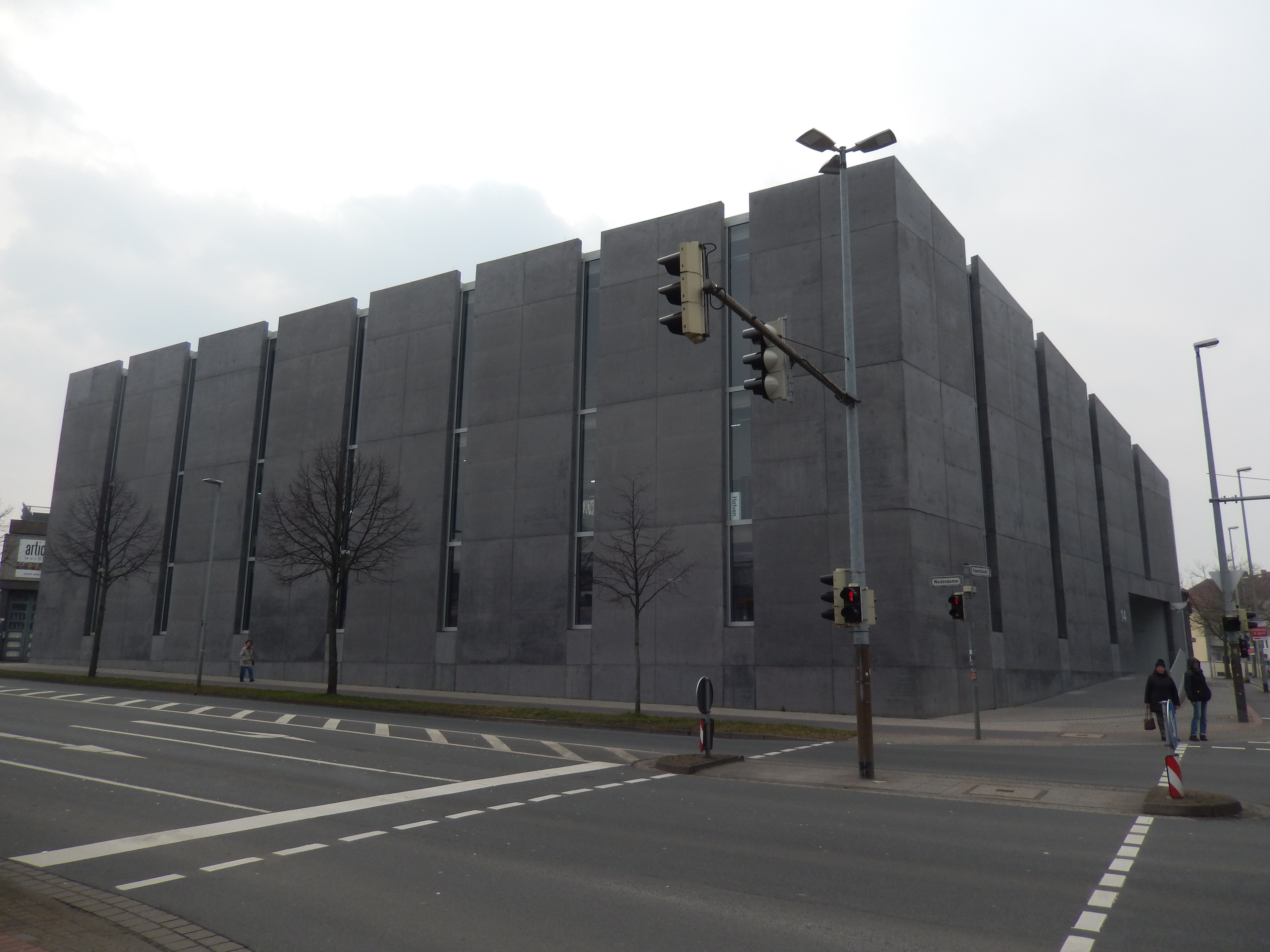 Hafven Hannover